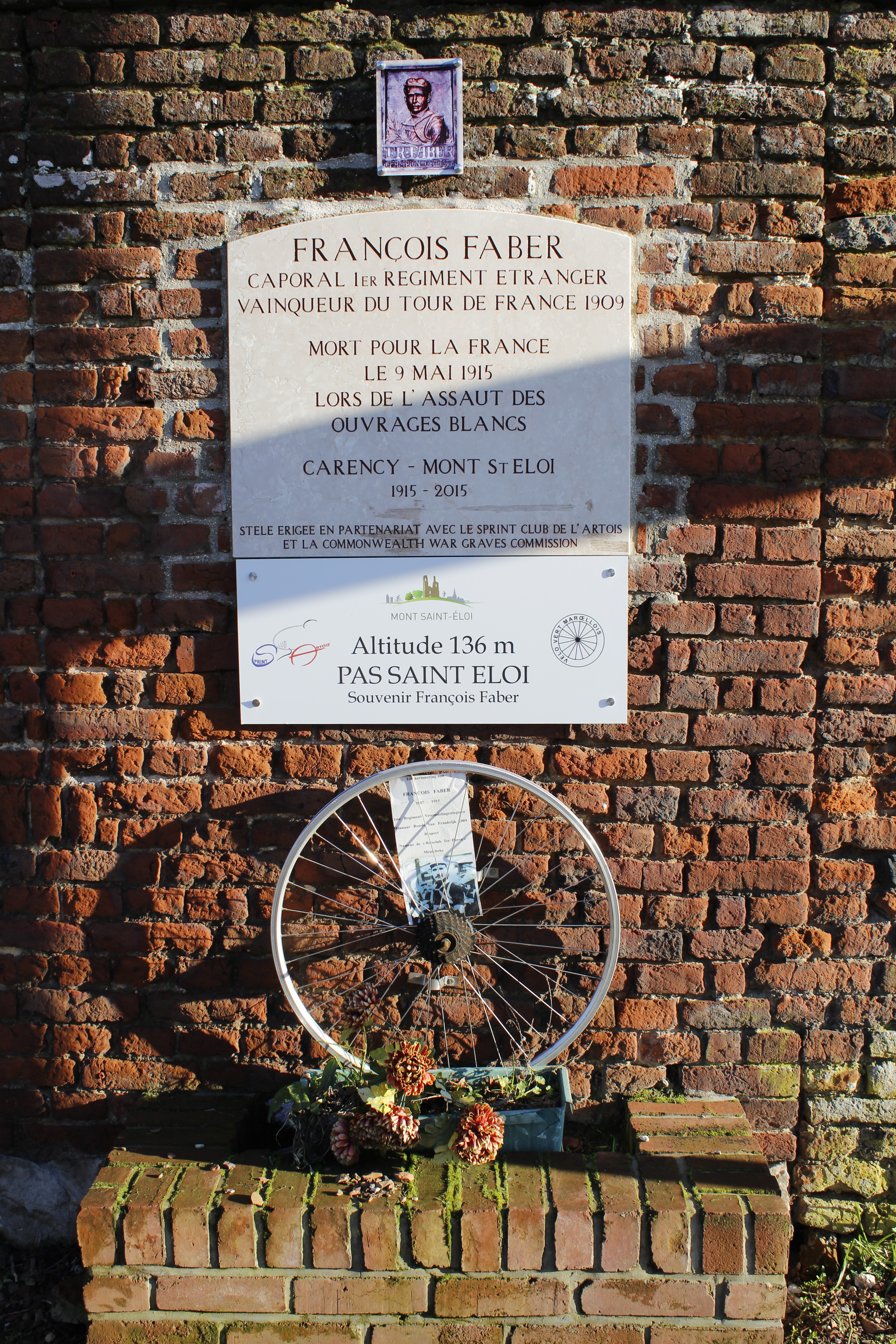 Stèle en hommage à François Faber, vainqueur du Tour de France 1909 ; disparu à Mont Saint Eloi en 1915 alors qu'il était caporal dans la Légion étrangère.